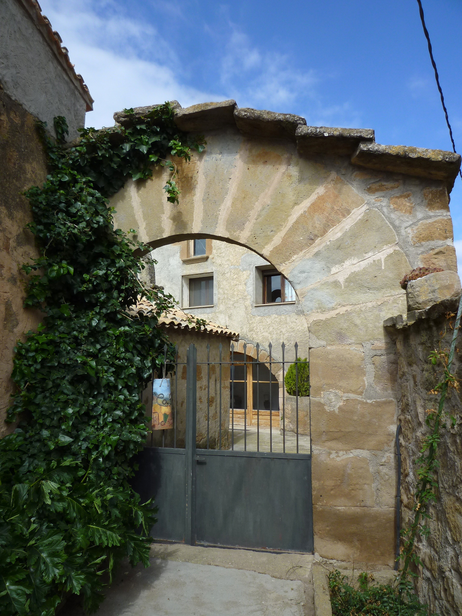 Casa Daniel (la Baronia de Rialb): portal del baluard